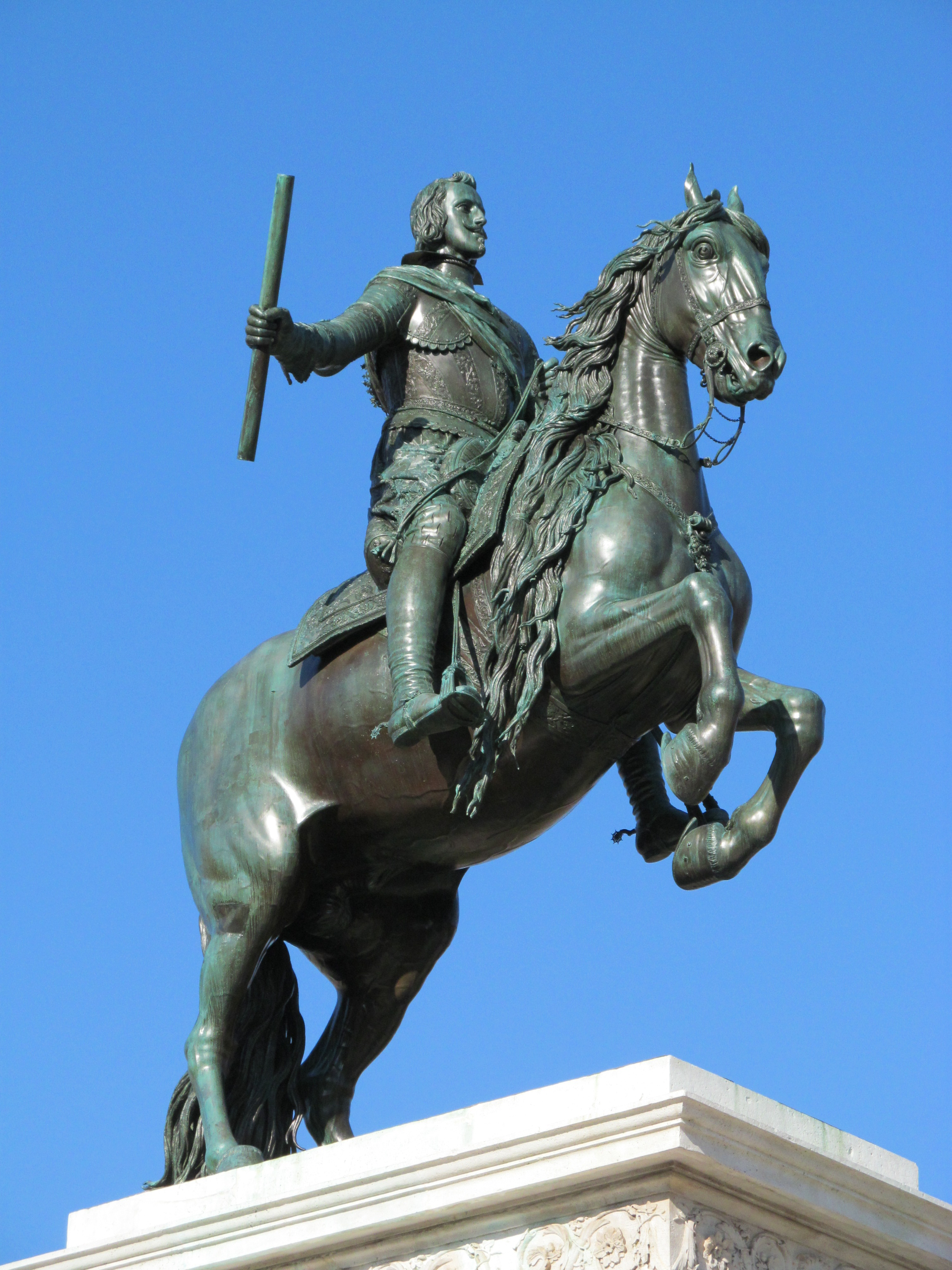 La estatua ecuestre de bronce de Felipe IV de España data de 1640 ubicada en la Plaza de Oriente de Madrid (España) e inaugurada en 1843. Esta escultura reunió, para su construcción, mayor cuota de talento: inspiraron su hechura dibujos de los pintores Pedro Pablo Rubens, Diego Velázquez y Juan Martínez Montañés; realizaron su modelado, escultura y fundido, durante siete años, los escultores, padre e hijo, Pietro Tacca.